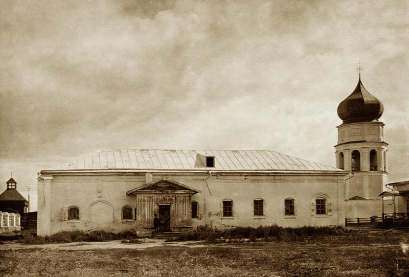 Воеводская канцелярия в Якутске